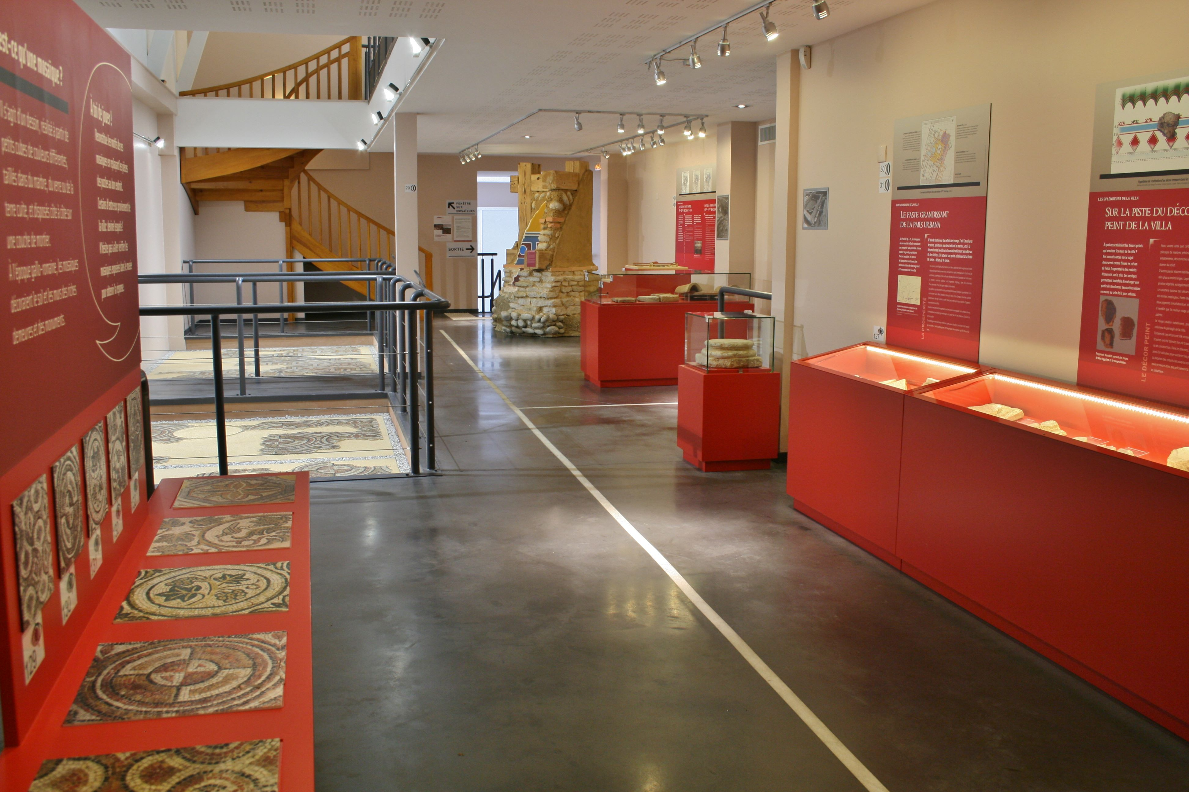 Photo de l'exposition permanente du Musée gallo-romain & Site archéologique de la villa de Lalonquette